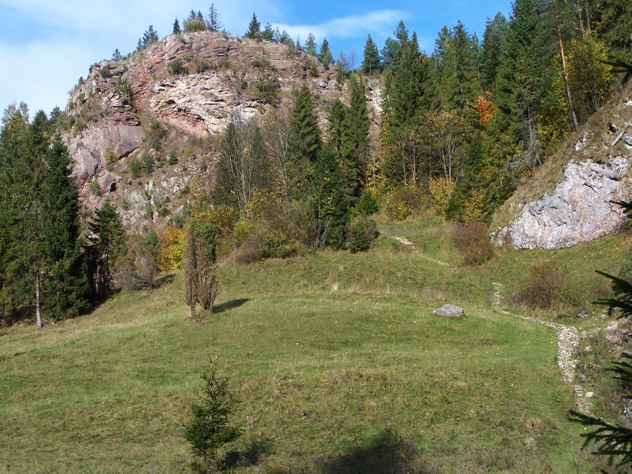 Wąwóz Homole (Pieniny)